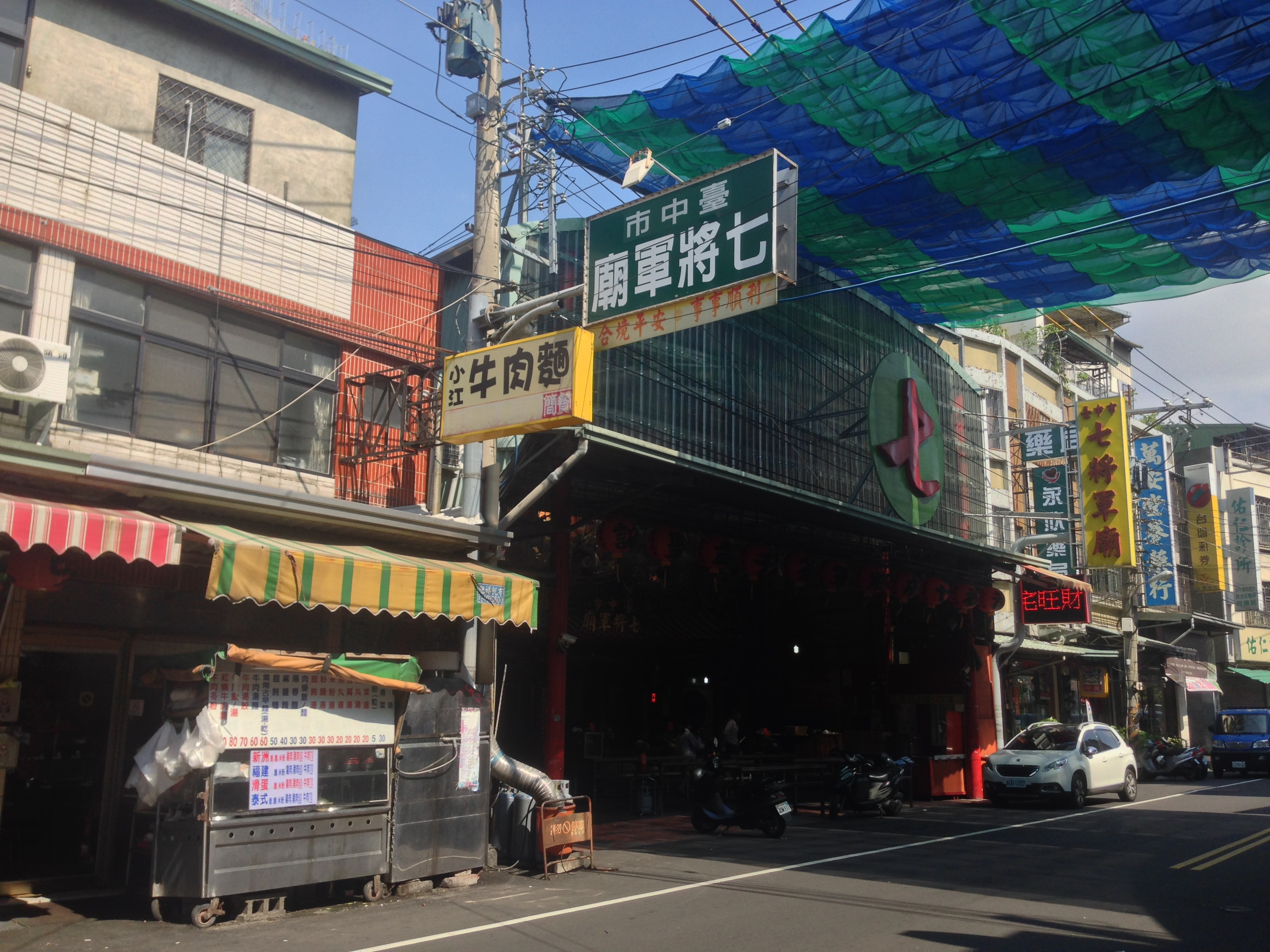 中文（台灣）: 大里七將軍廟外觀